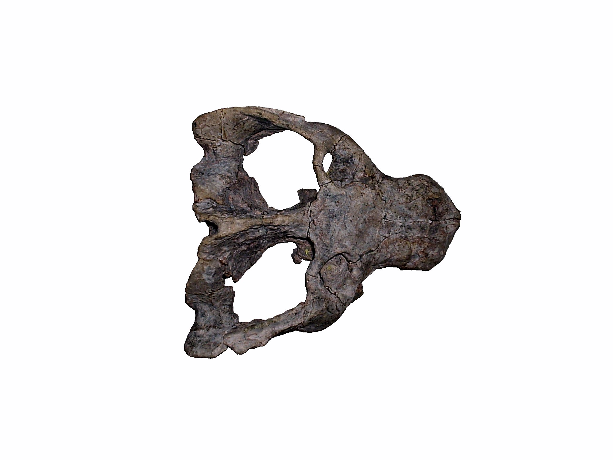 Cranio Exaeretodon